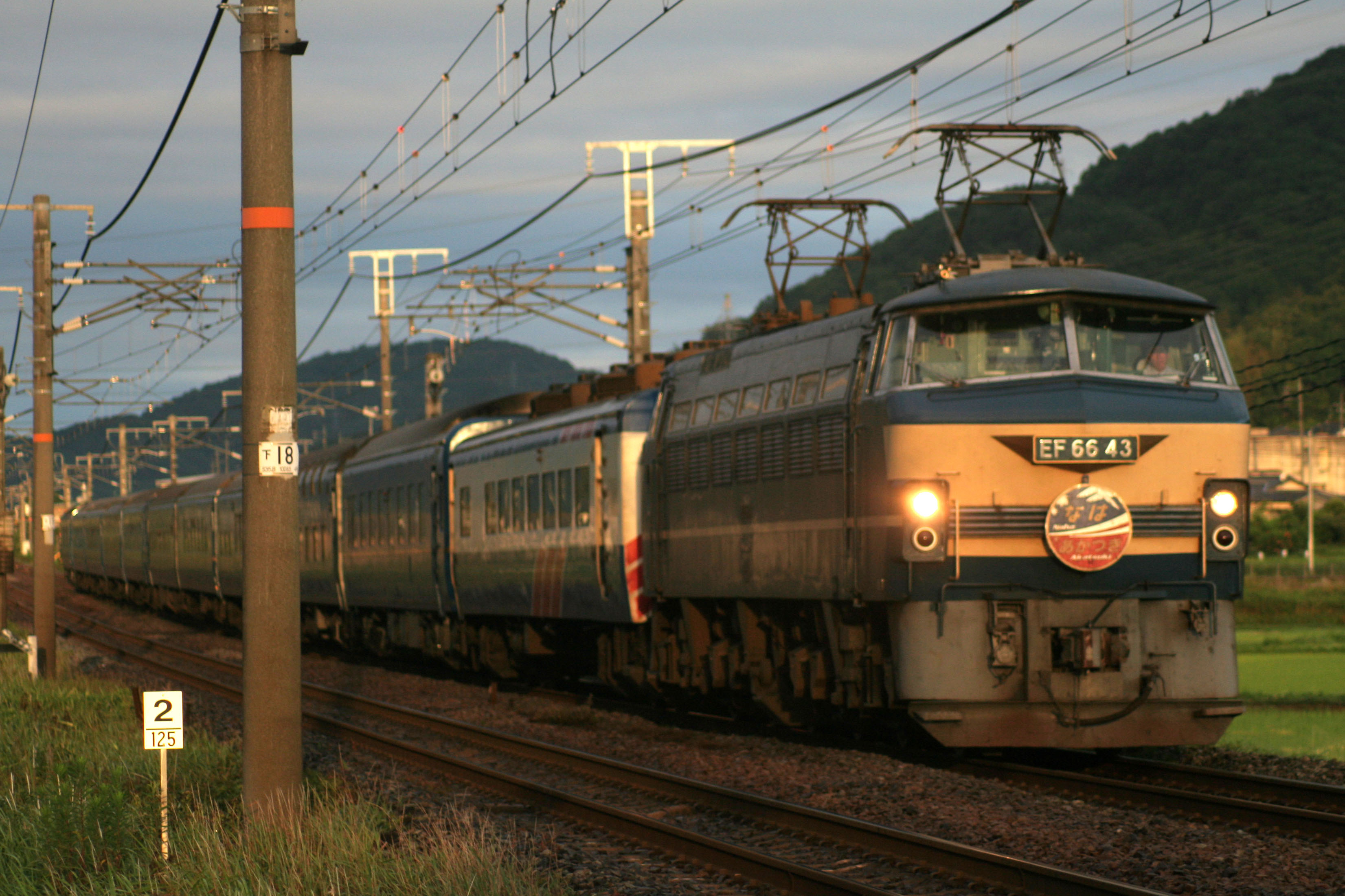 寝台特急なは･あかつき。山陽本線、瀬戸～万富間（神戸起点125.2km付近）。